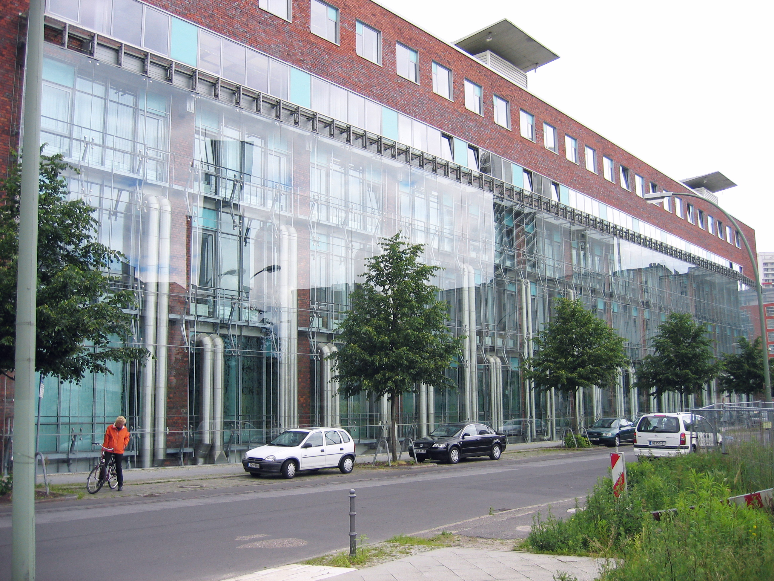 Bundesdruckerei in Berlin, Seitenansicht (2005 fotografiert von Johann H. Addicks)